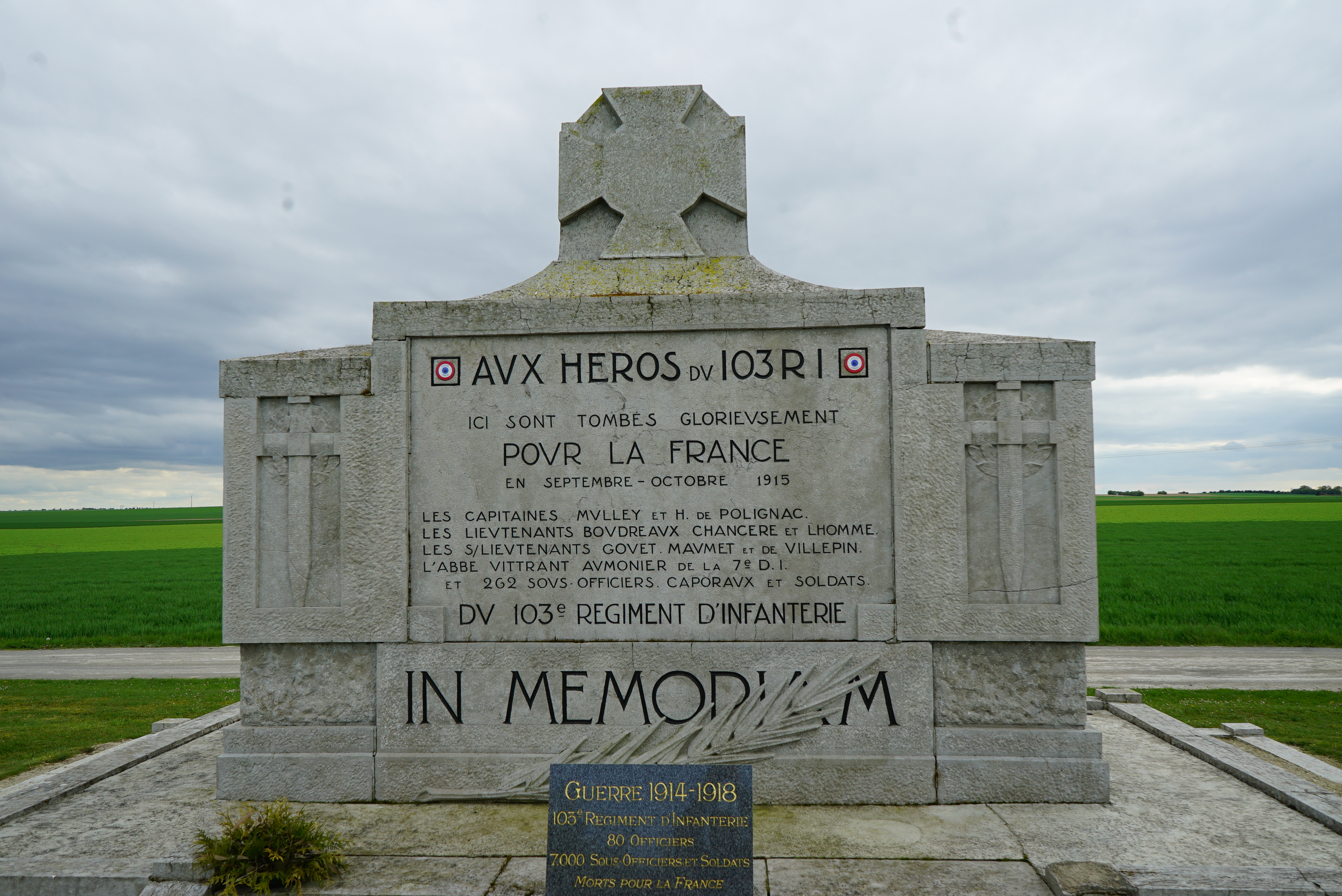 lors du Centenaire de la bataille des monts de champagne. Monument Polignac au "héros du 103RI".